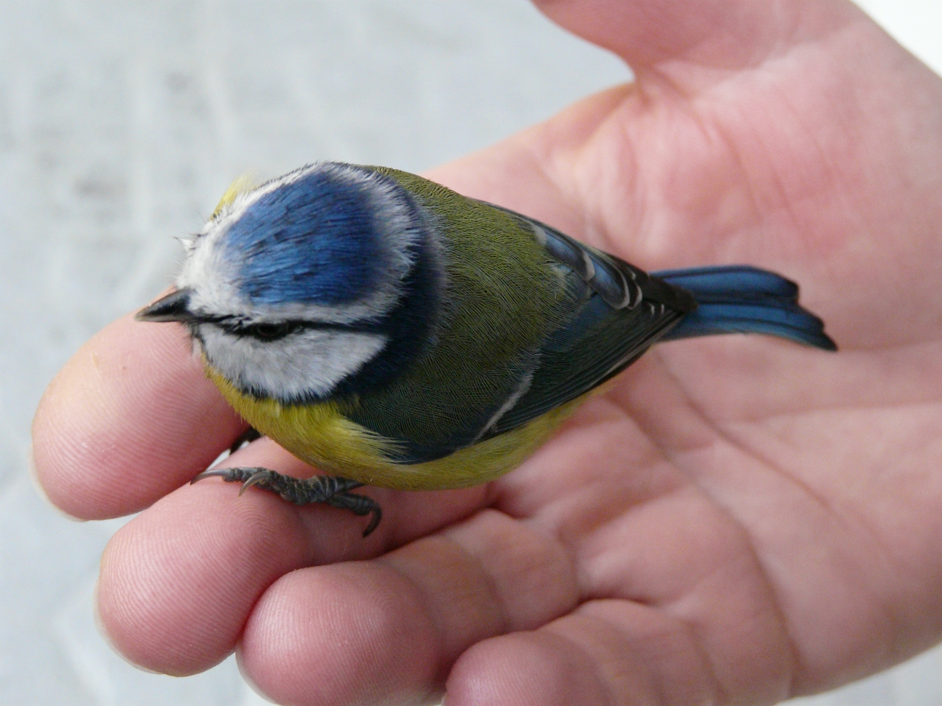 Mésange bleue (Cyanistes caeruleus) en train de récupérer après avoir violemment heurté une vitre